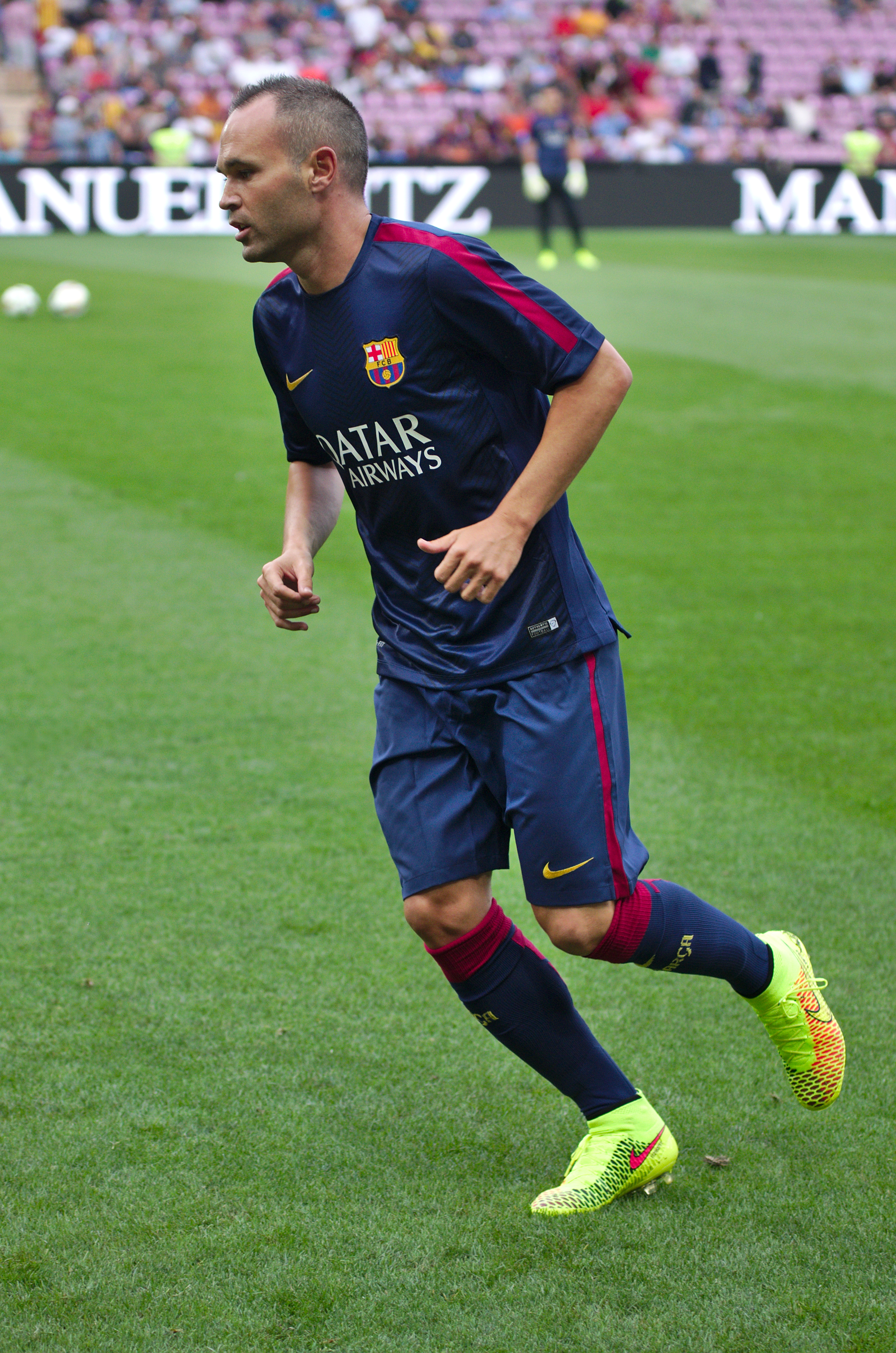 Barça - Napoli - 20140806 - Andres Iniesta